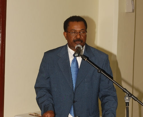 Imagen del señor Leoncio Amé Demes